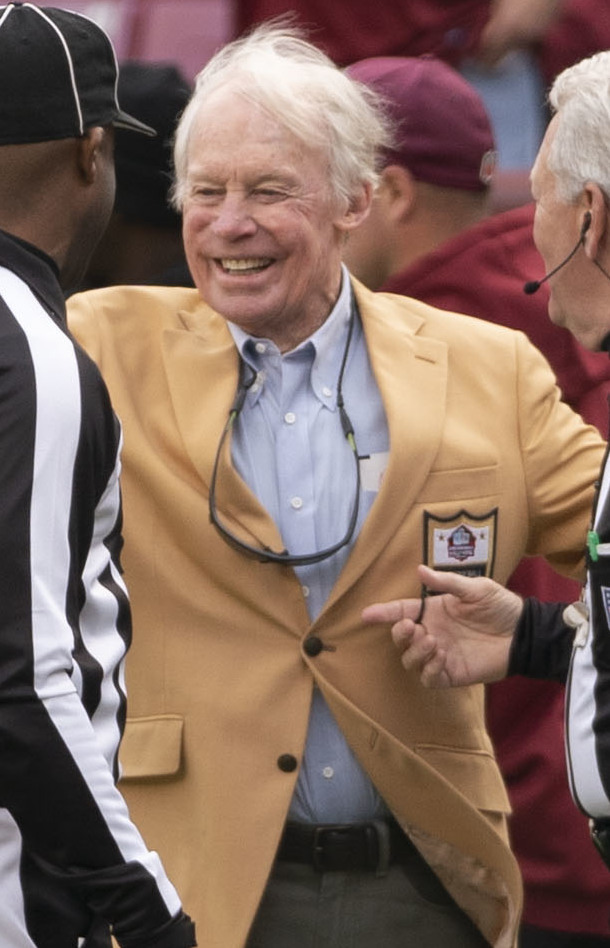 Texans at Redskins 11/18/18